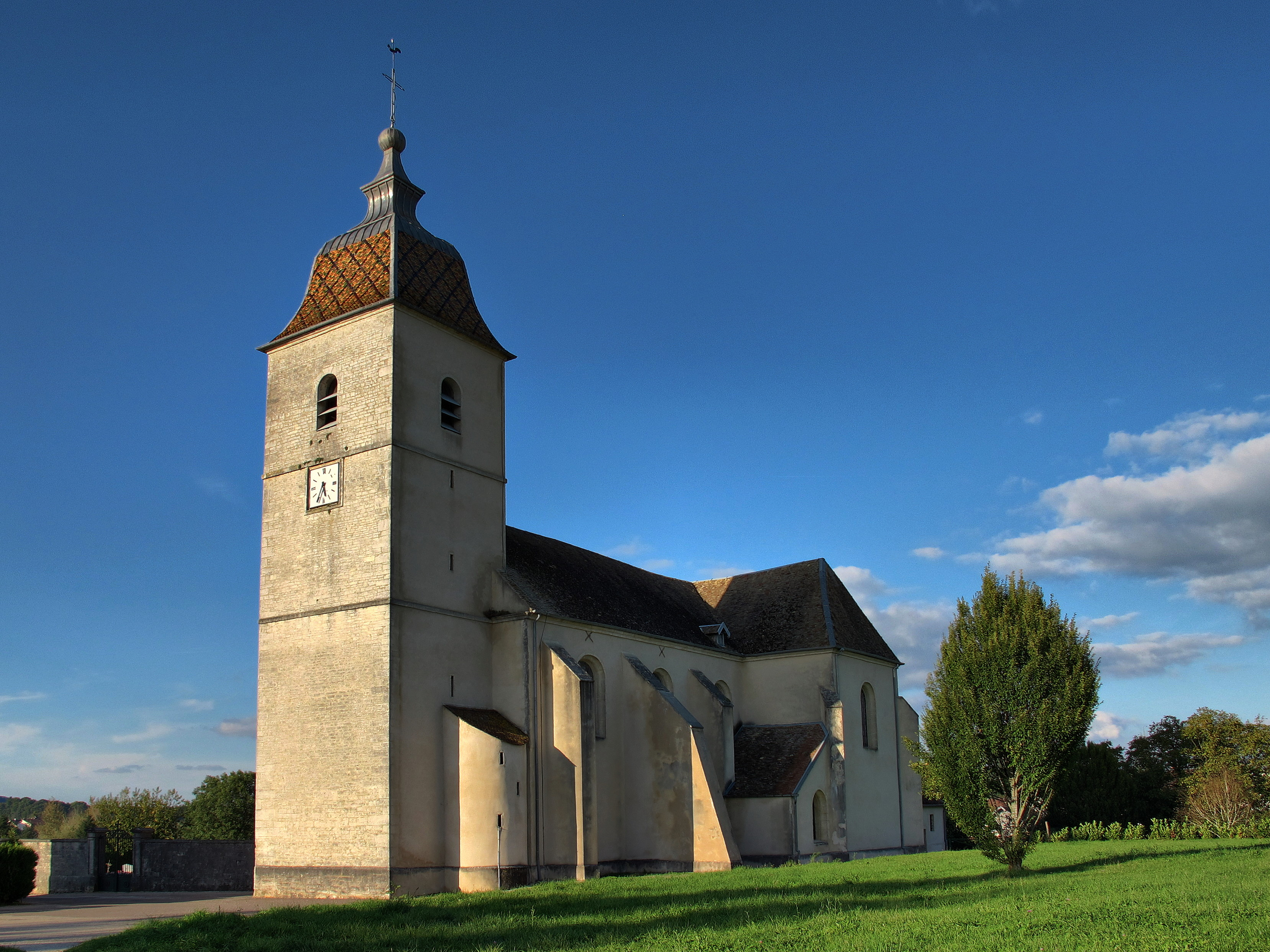 Eglise de Boult (Haute-Saône, France)